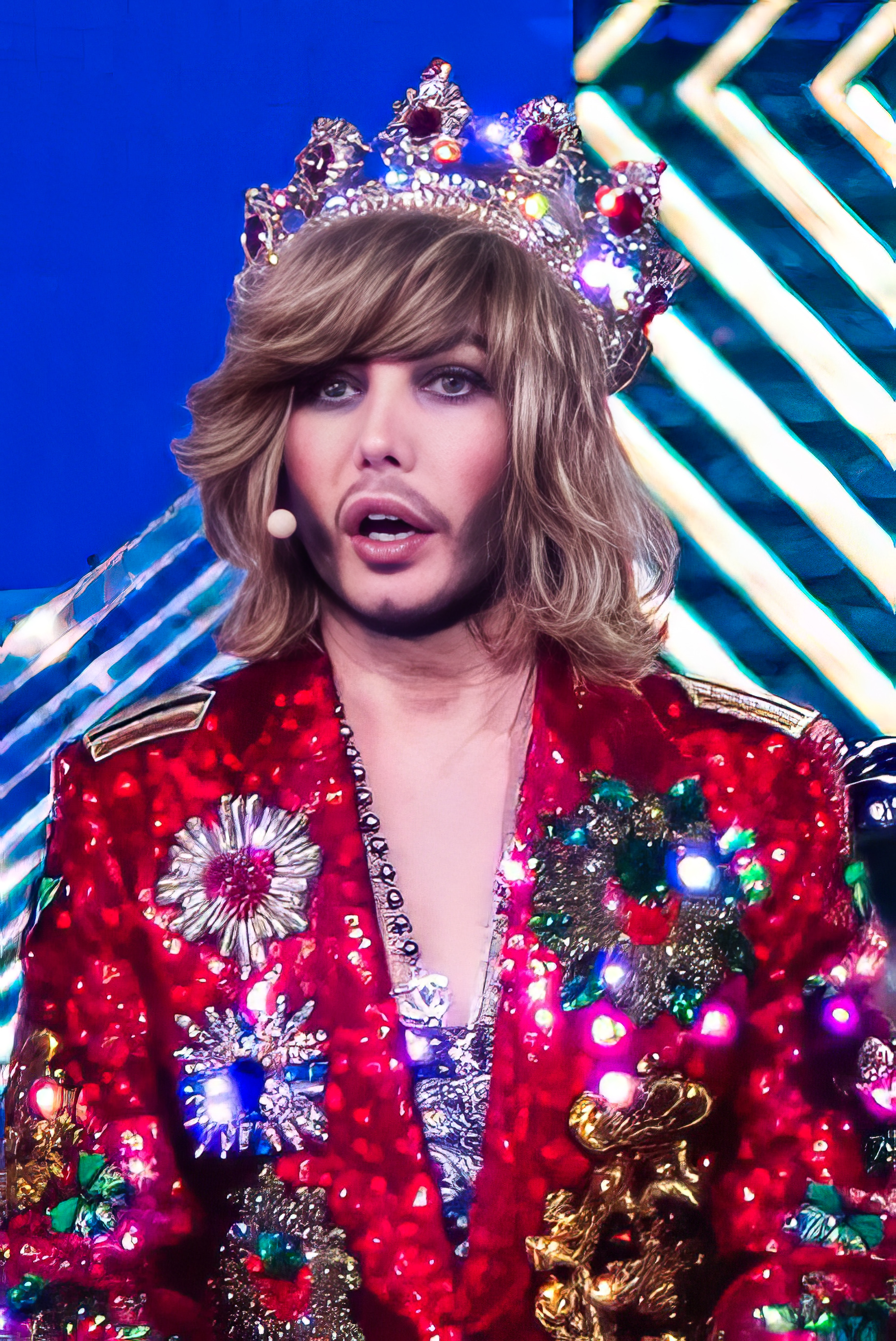 Иван Чуйков и Сергей Зверев на «Шоу выходного дня»